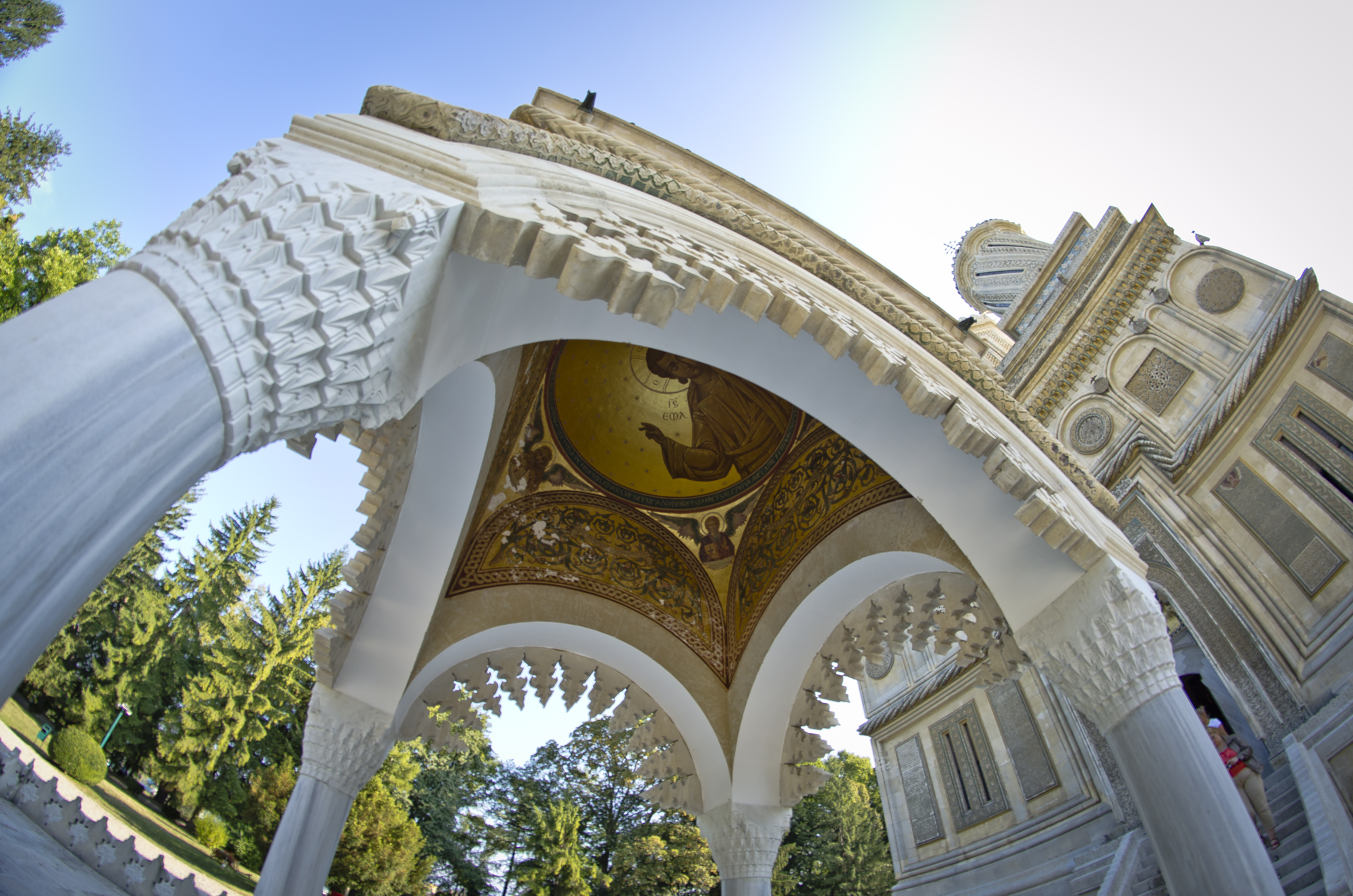 Agheasmatarul din fata Manastirii Curtea de Arges.